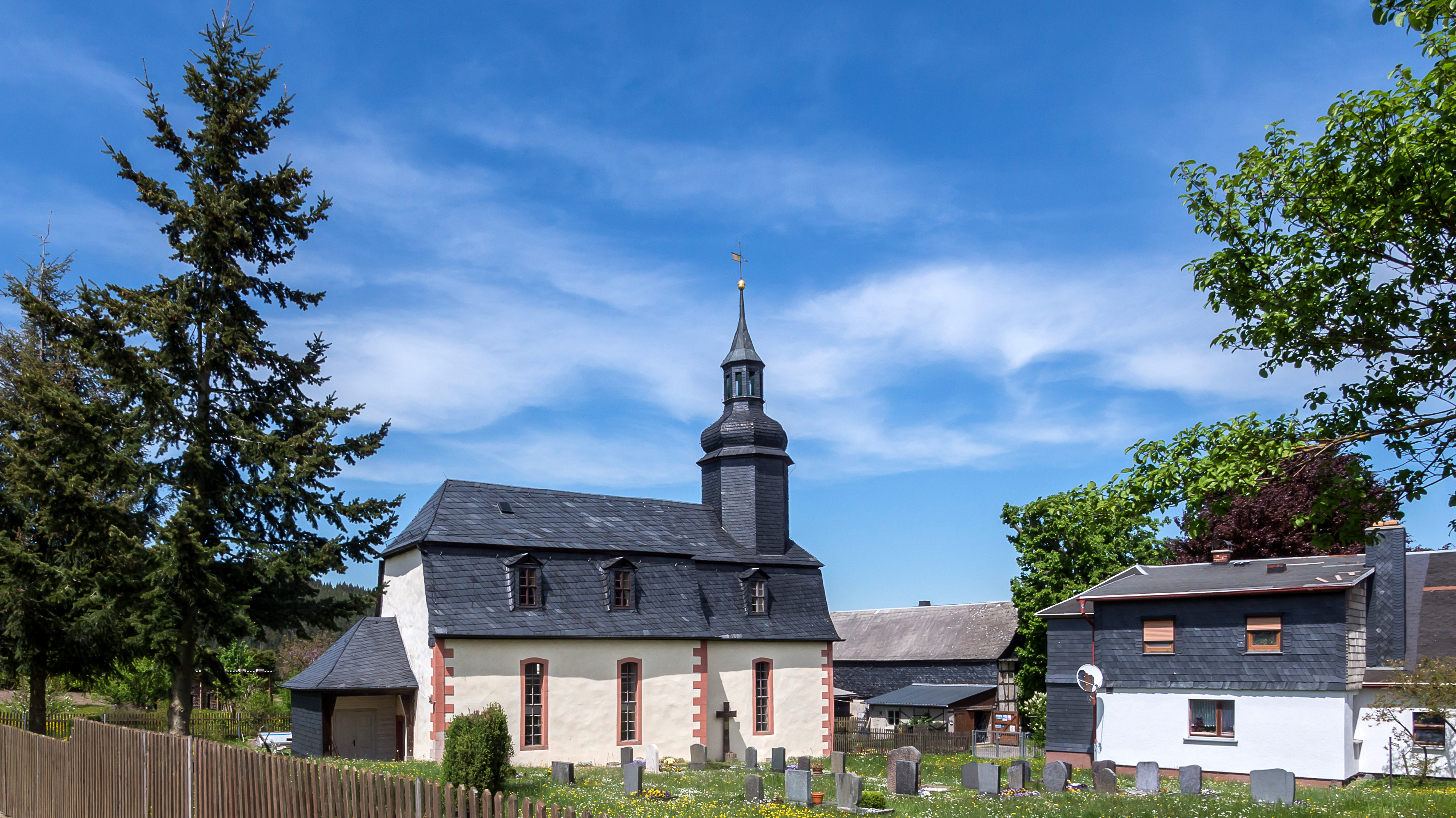 Lositz Kirche mit Ausstattung